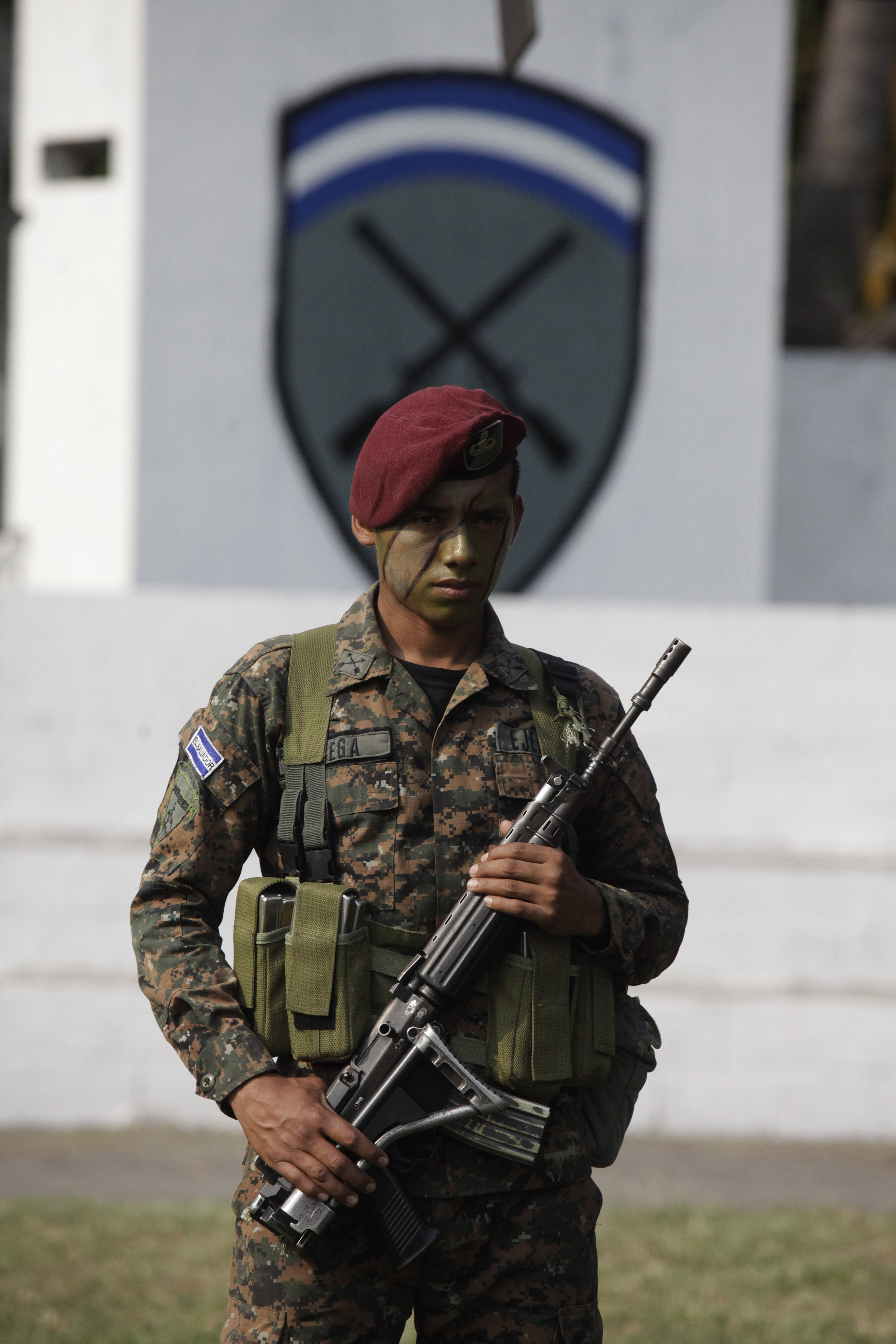 Lanzamiento de las Fuerzas Especailizadas de Reacción El Salvador, FES.